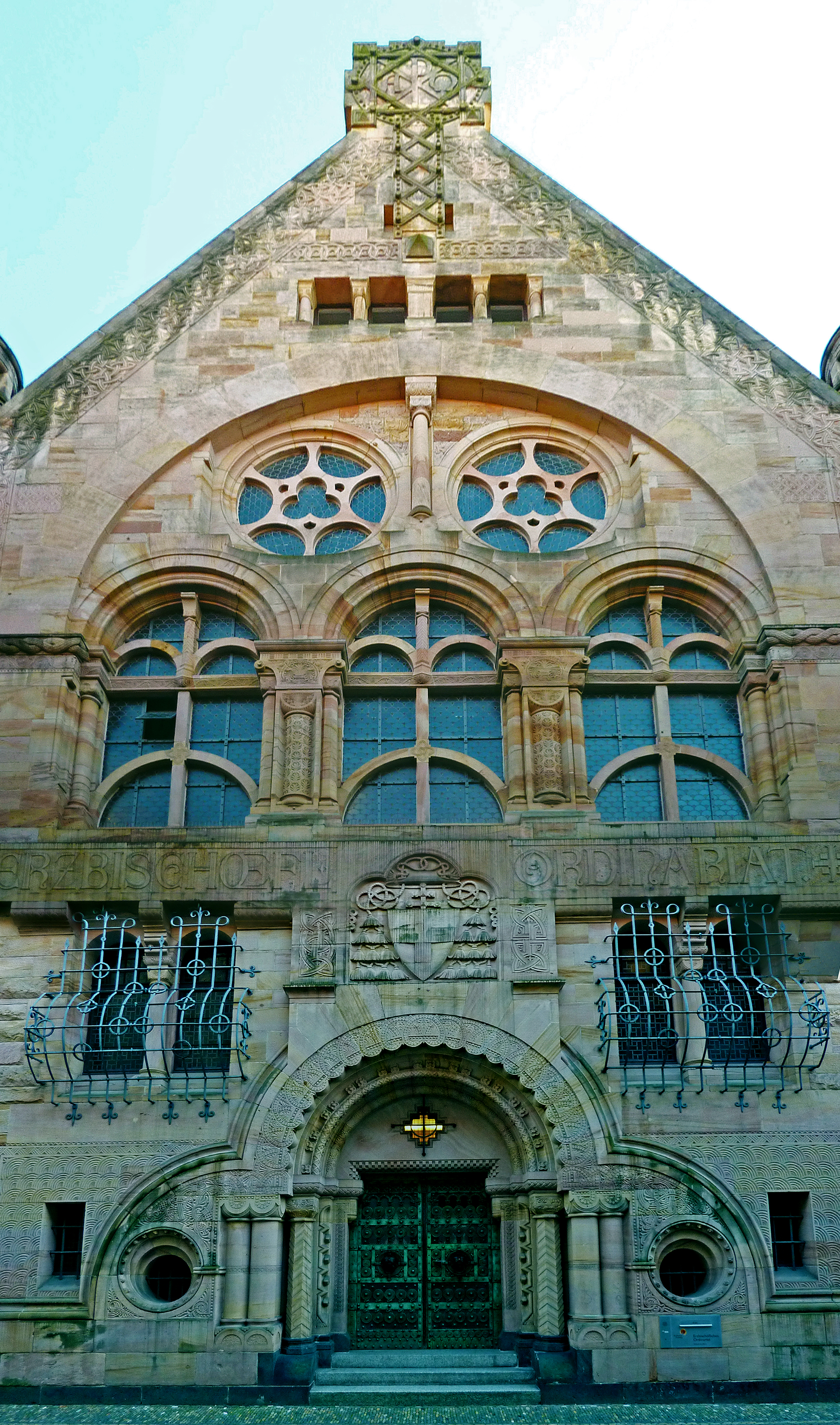 Panoramafoto vom Eingangsbereich des Erzbischöflichen Ordinariats Freiburg